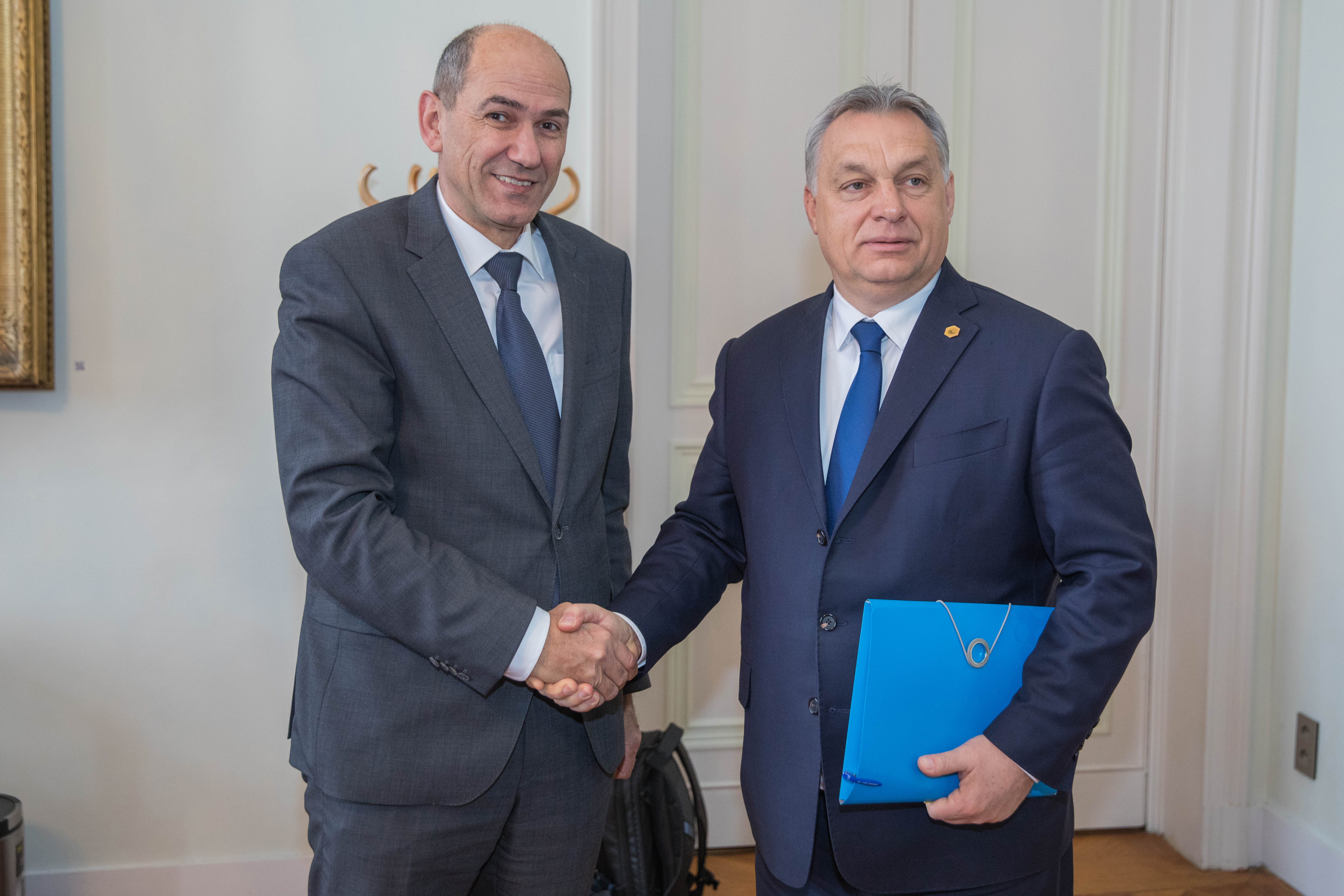 EPP Summit, 22 March 2018